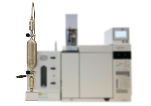 Баллон (контейнер) с отобранной пробой газа, присоединен к лабораторному хроматографическому анализатору для анализа содержимого